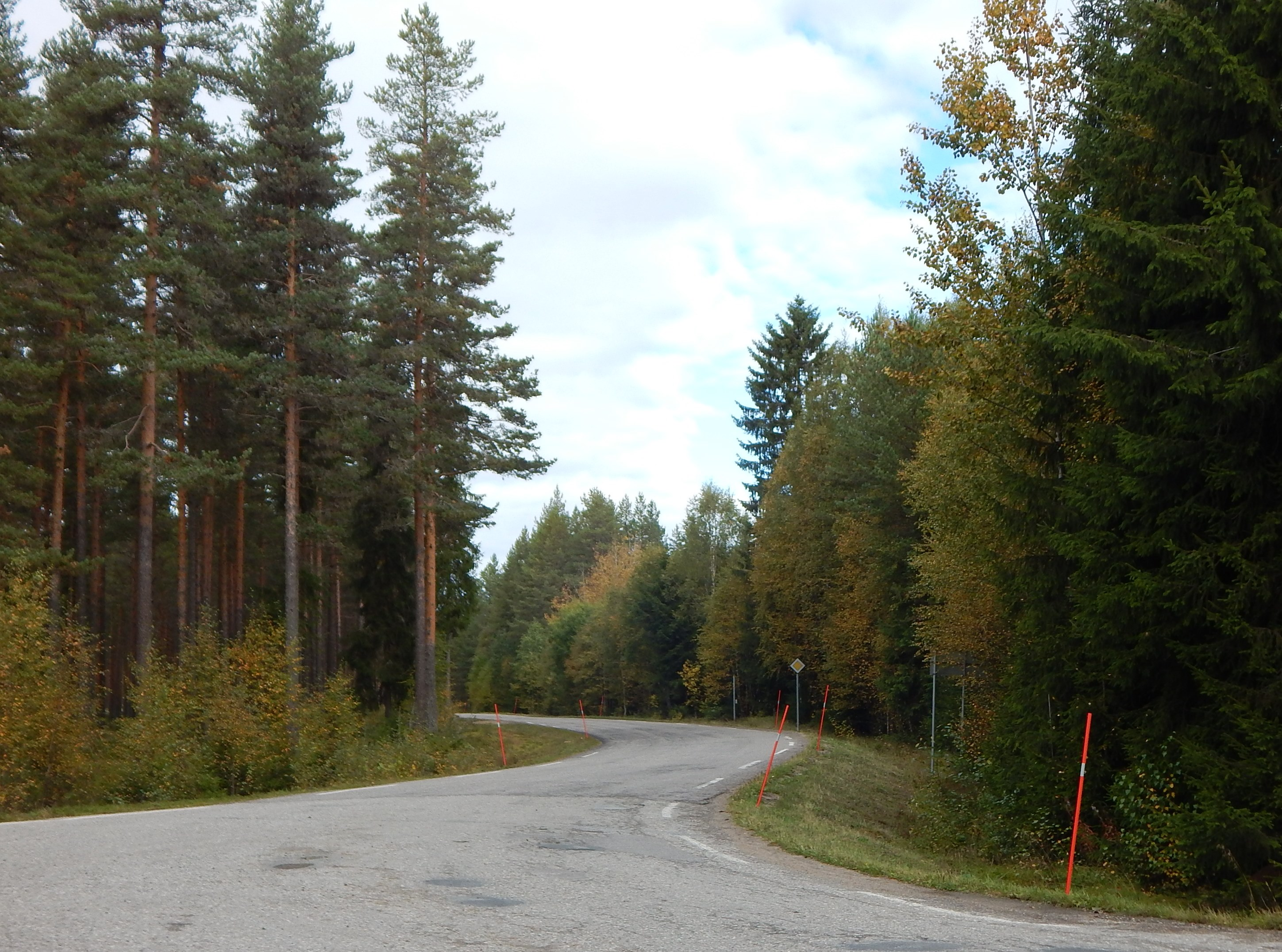 Starmovegen (fylkesvei 552) sett fra Nøtåsvegen (fylkesvei 530)